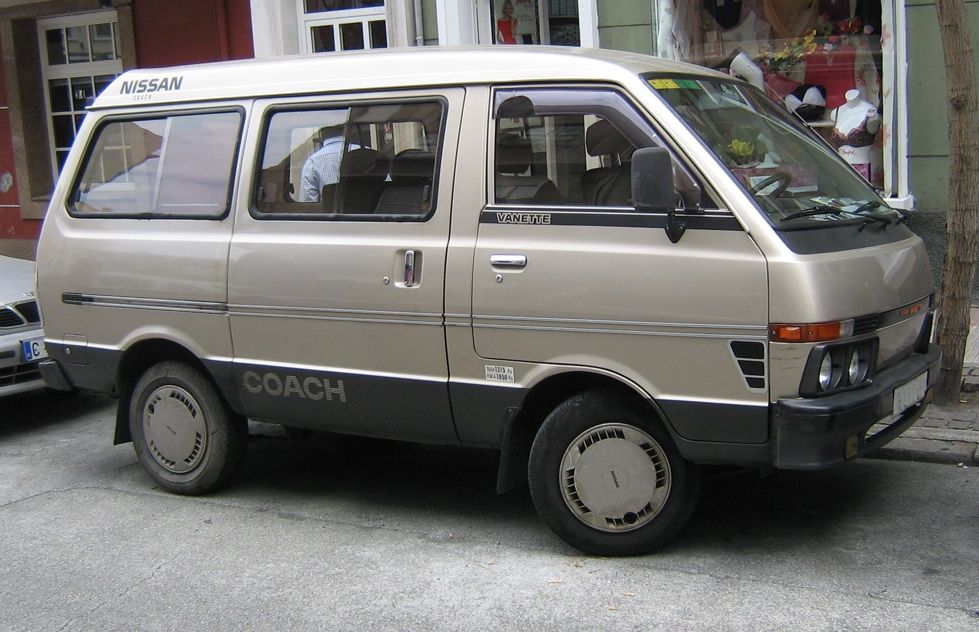 Una furgoneta Nissan Vanette Coach.